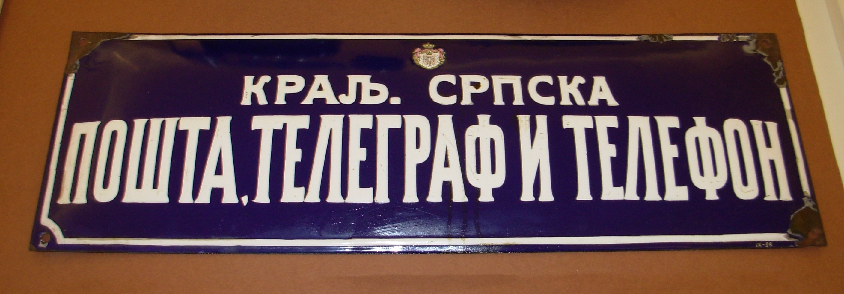 Tabla na Poštama u doba Kraljevine Srbije. Ptt Muzej u Beogradu. Slikao Goldfinger